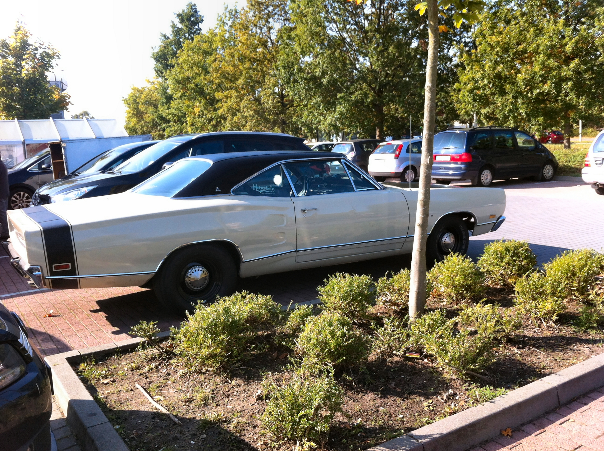 Dodge Coronet Coupe